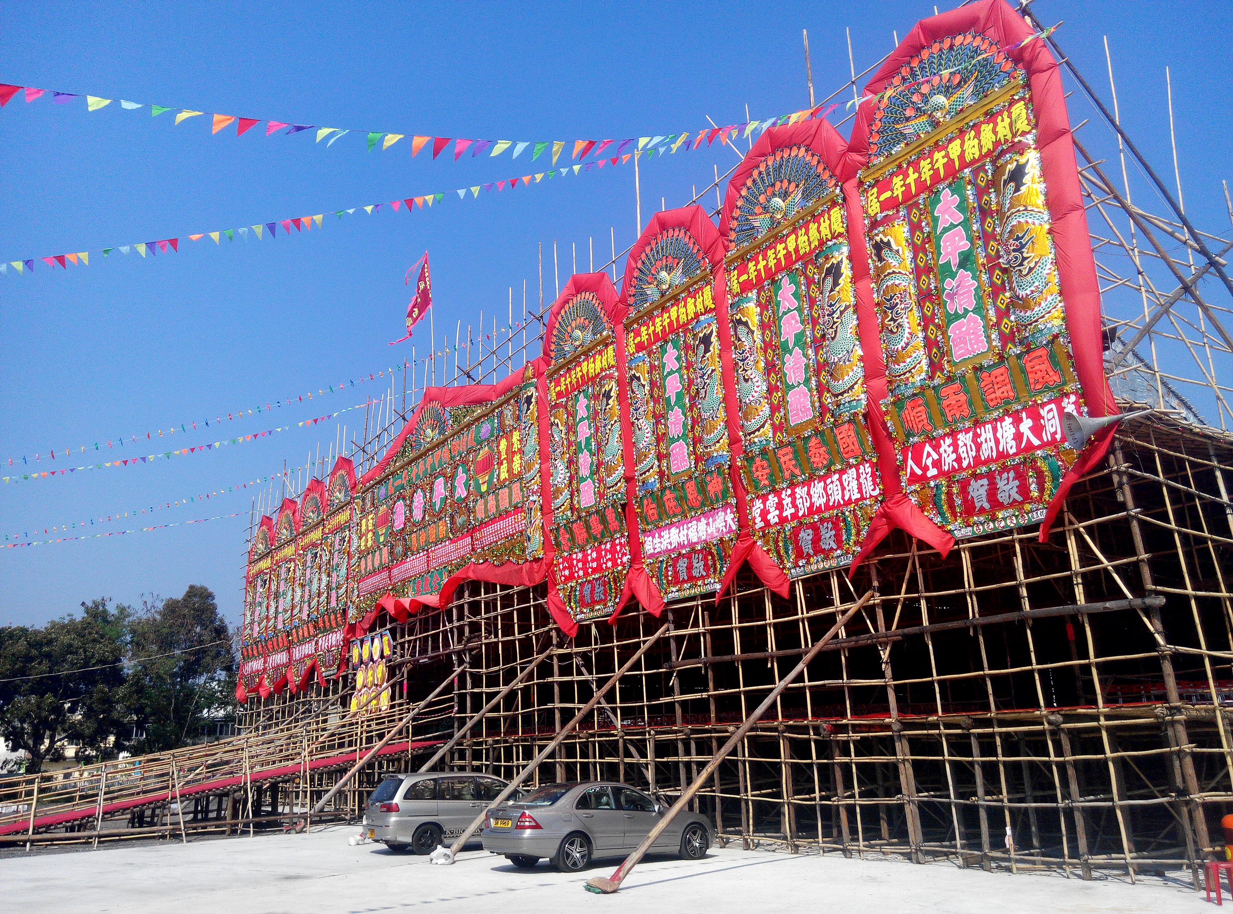 中文（香港）: 廈村約甲午太平清醮大戲棚